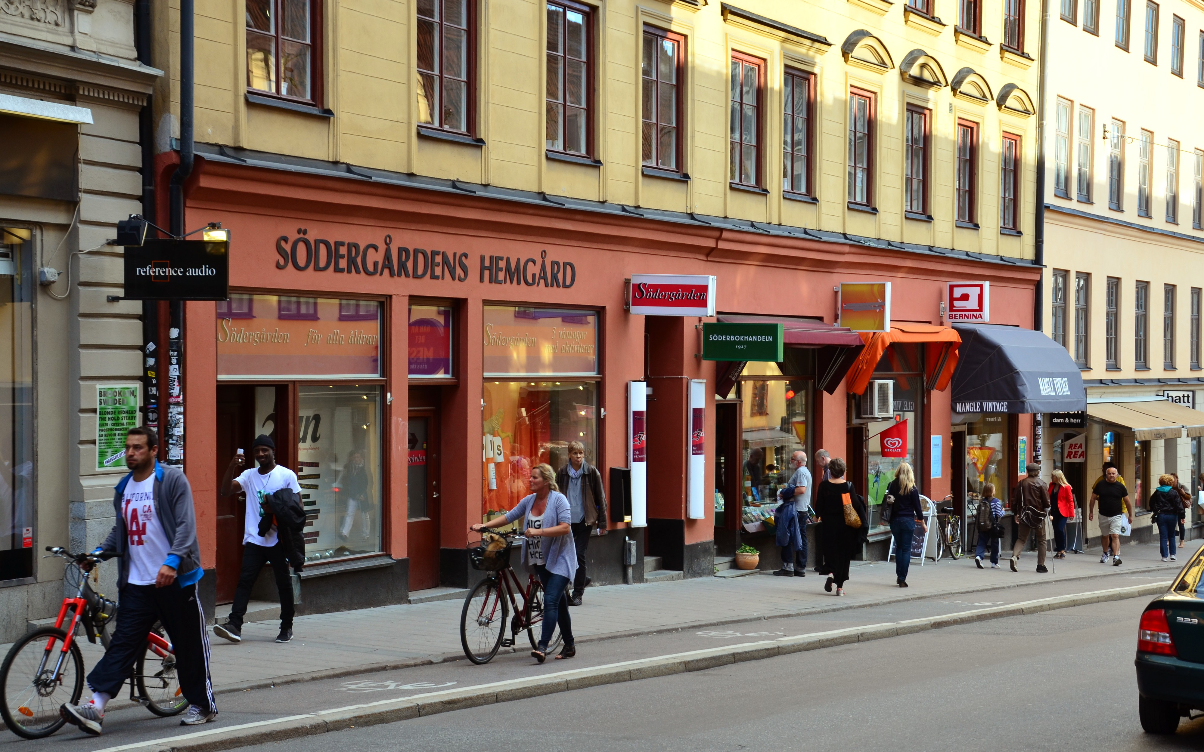 Hemgården Södergården på Södermalm i Stockholm.